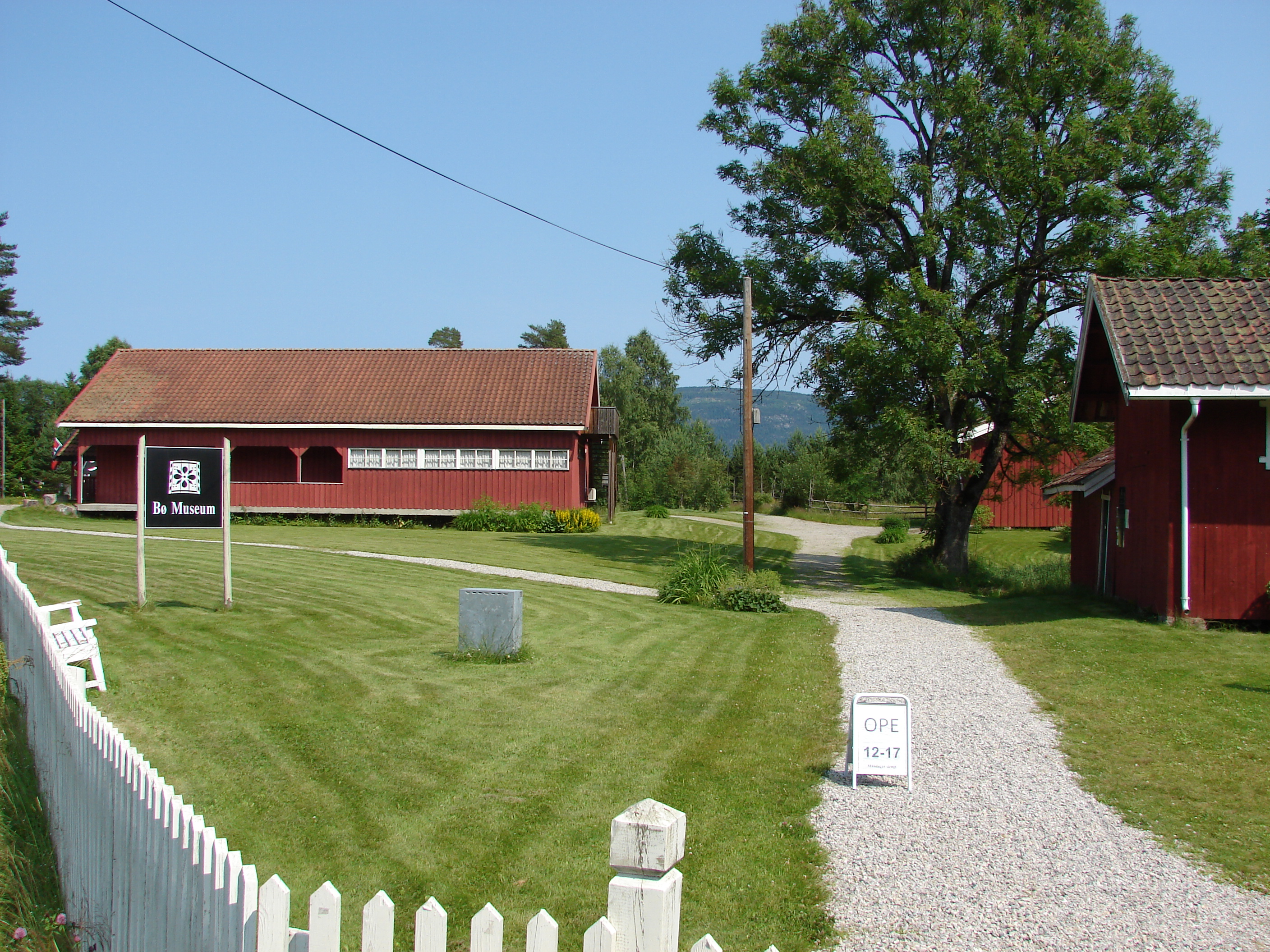 Bø Museum, Bø i Telemarken, Norge